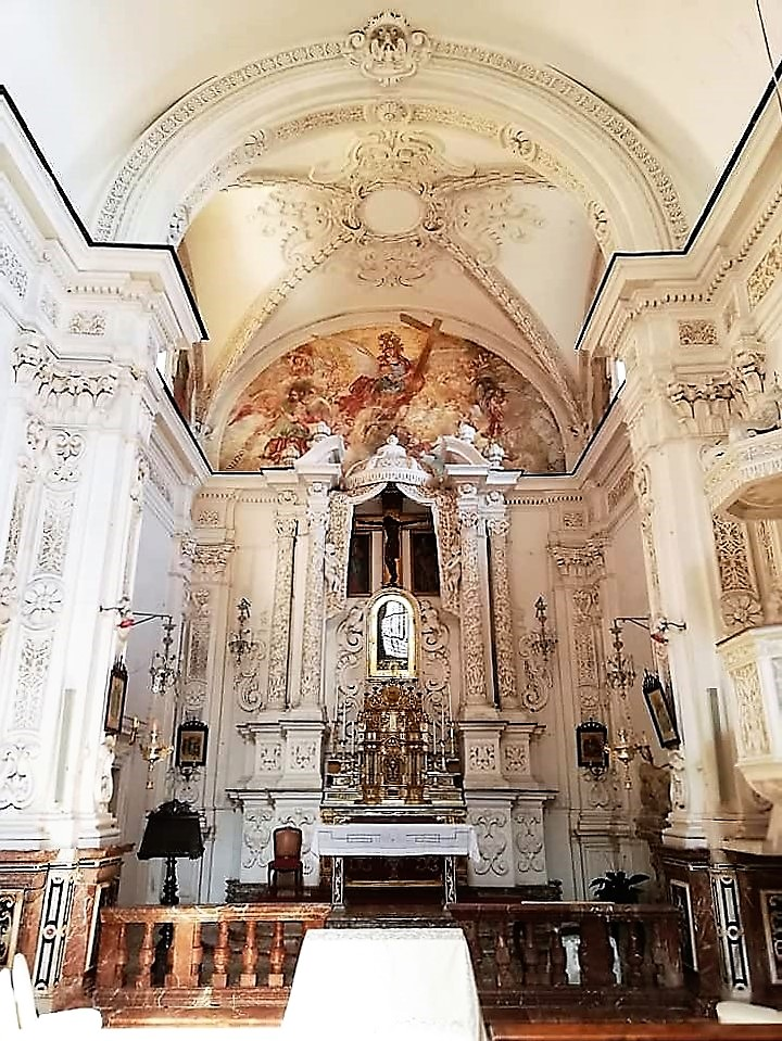 Presbiterio.